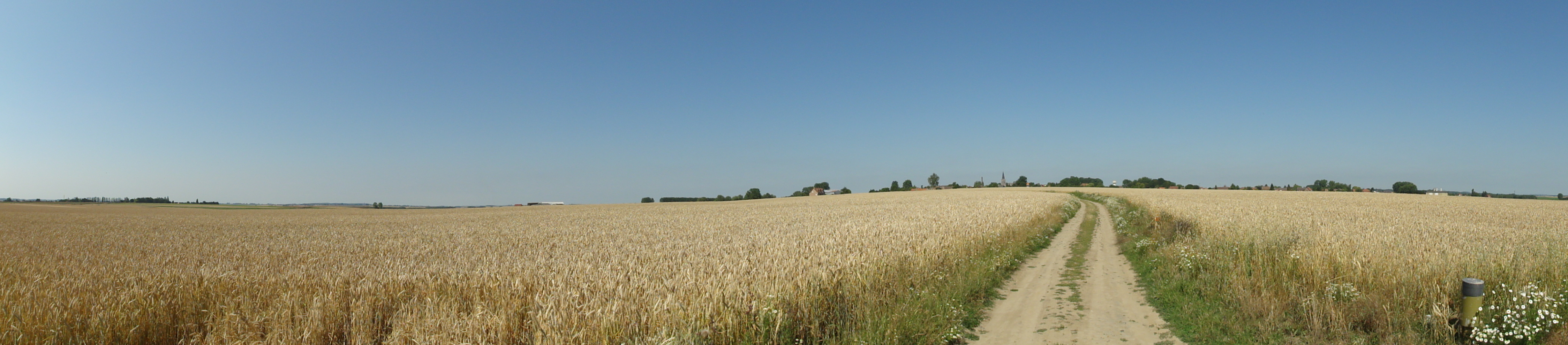 La Fosse de Fressain de la Compagnie des mines d'Aniche était un charbonnage constitué de deux puits situé à Fressain, Nord, Nord-Pas-de-Calais, France.